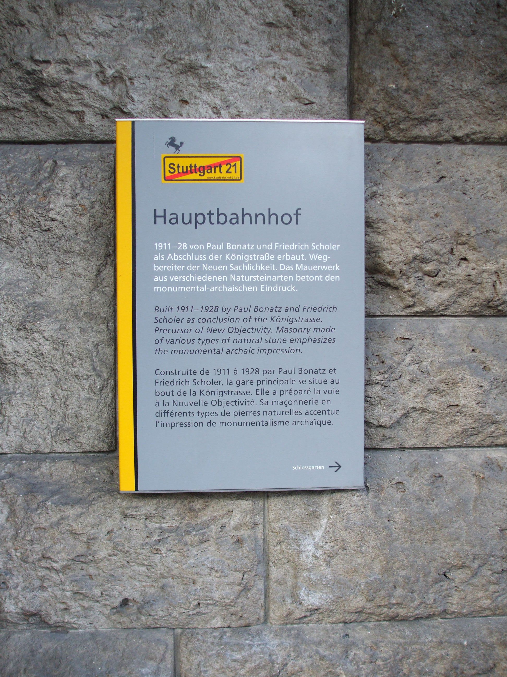 Schild, neben dem Haupteingang mit Aufkleber "Stuttgart 21"